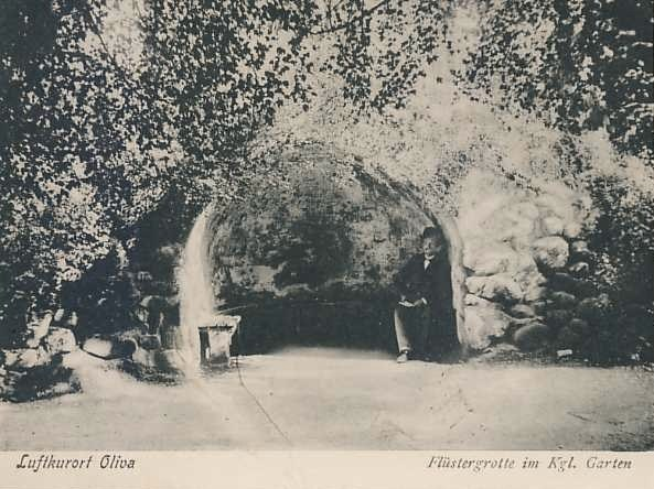 Gdańsk. Park Oliwski, "Groty Szeptów".